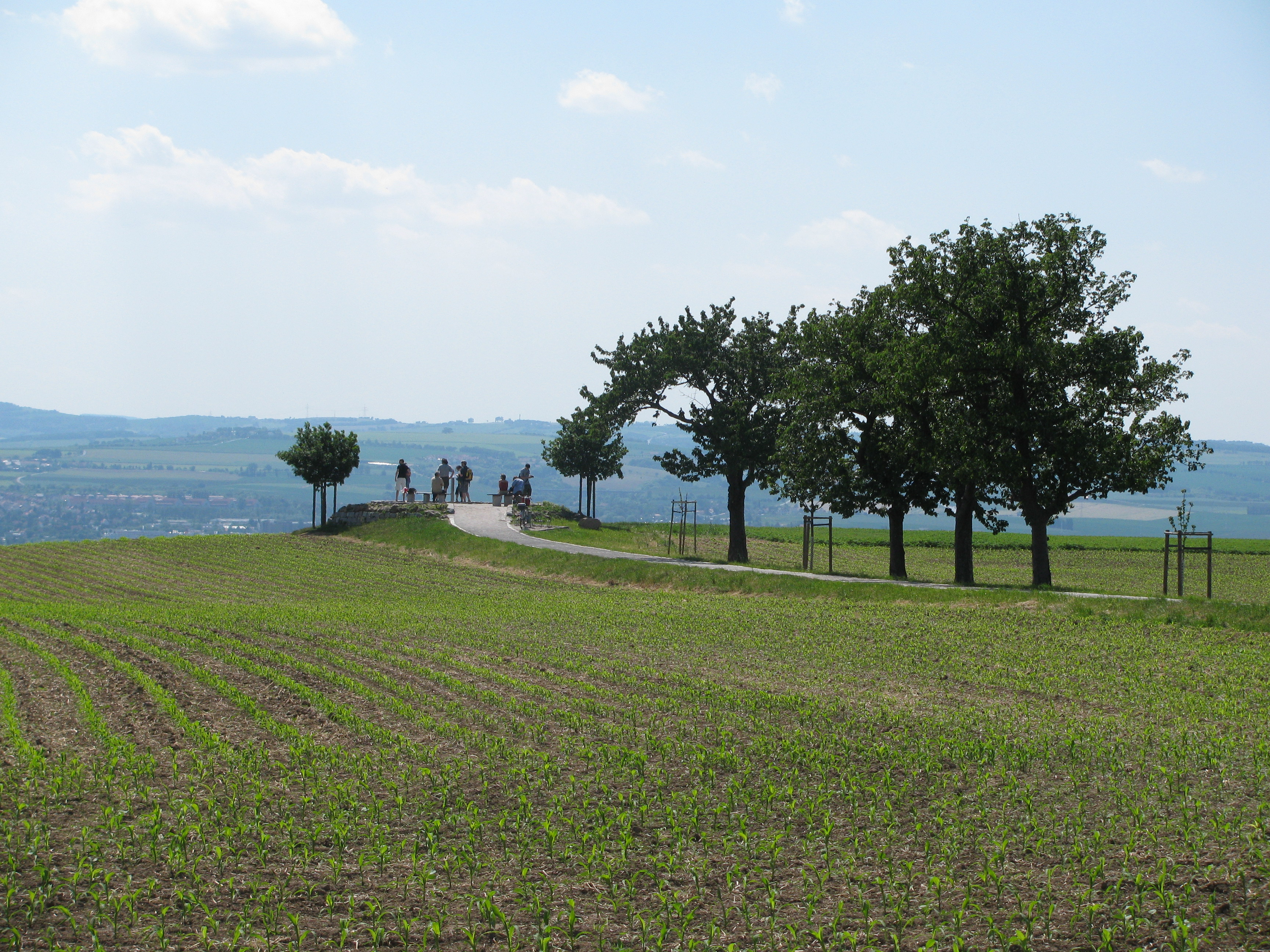 Aussichtspunkt Sachsens Hiefel in Rockau, Ortsteil von Dresden. Blick über den Elbtalkessel in Richtung Osterzgebirge.